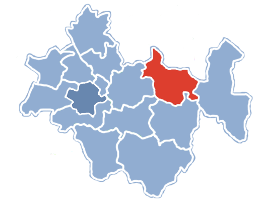 Położenie gminy Masłowice na terenie powiatu radomszczańskiego.